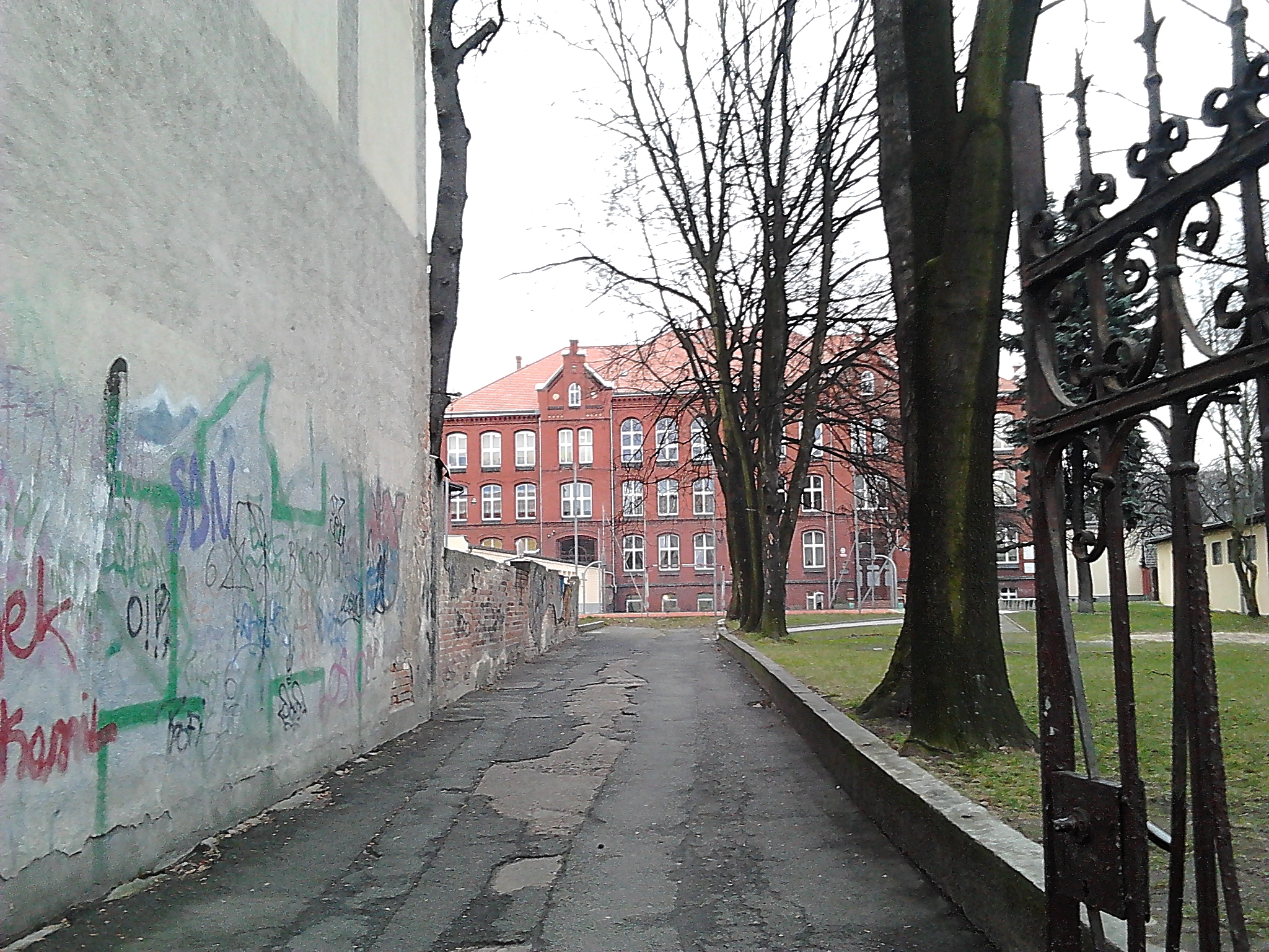 Gimnazjum nr 1, Jelenia Góra, ul. Piłsudskiego 23